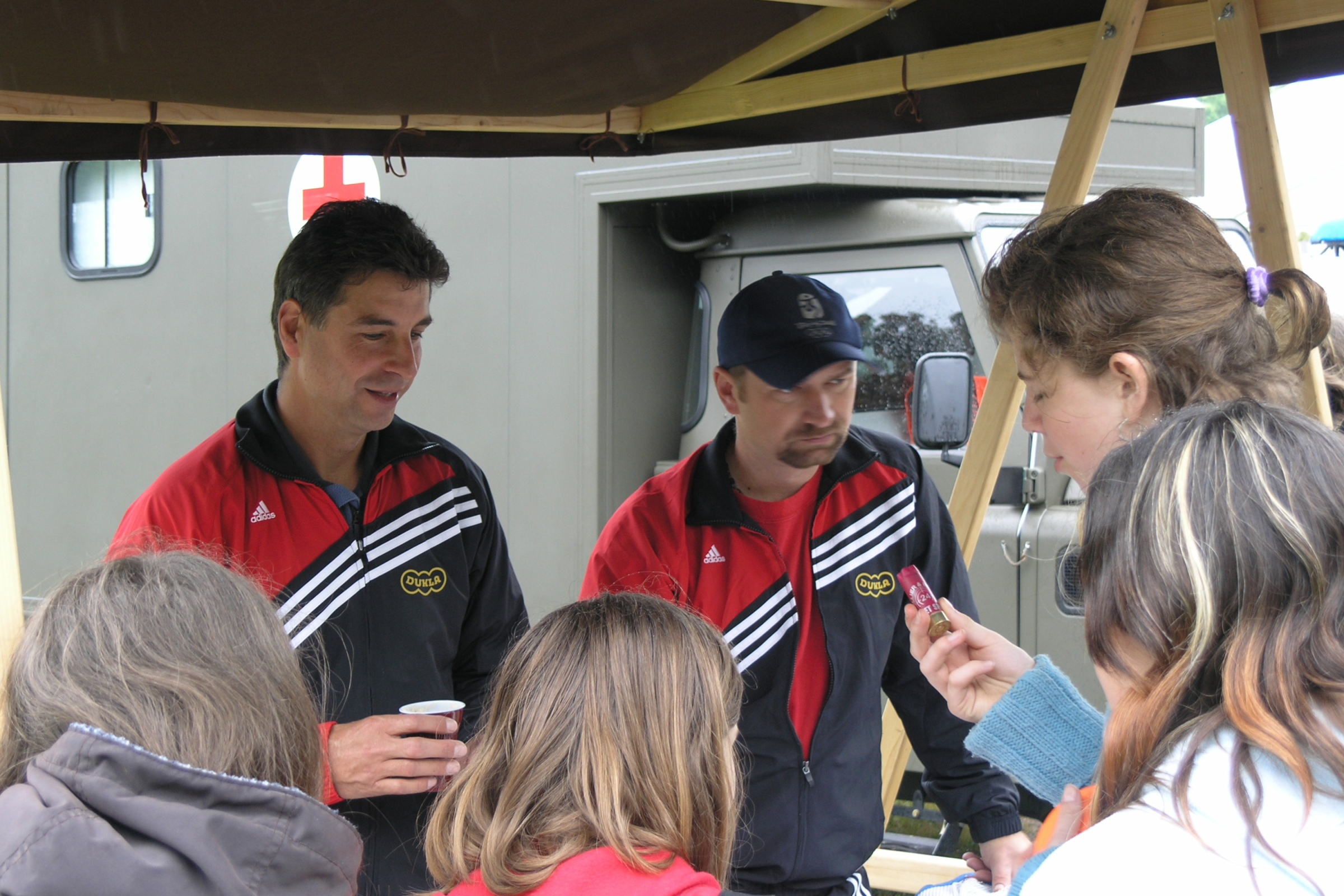 Čeští sportovní střelci Leoš Hlaváček (vlevo) a Jan Sychra představují svůj sport na Bambiriádě 2008 v Hradci Králové